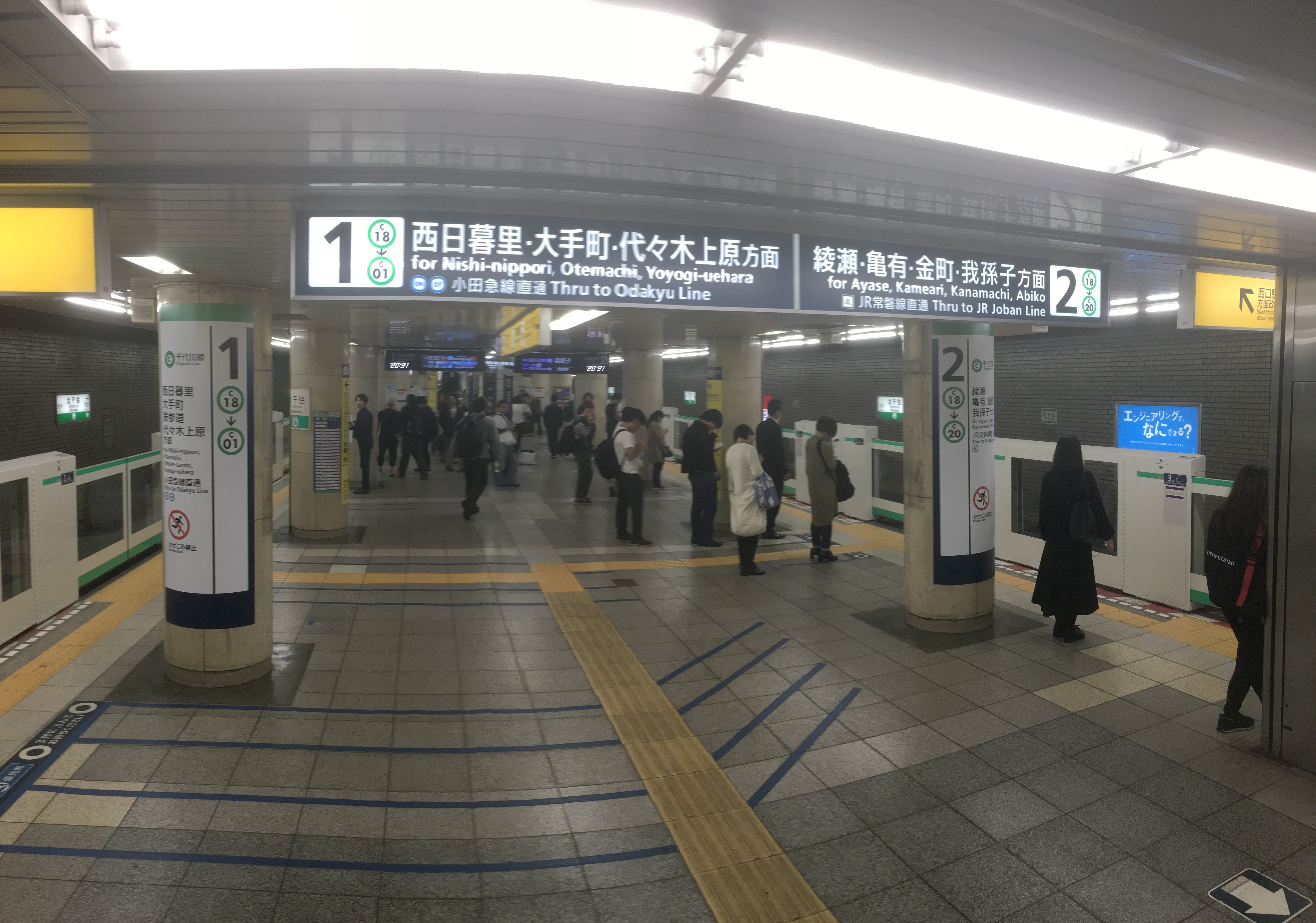 千代田線、北千住駅のホーム (Chiyoda Line, Kitasenju Station platforms)